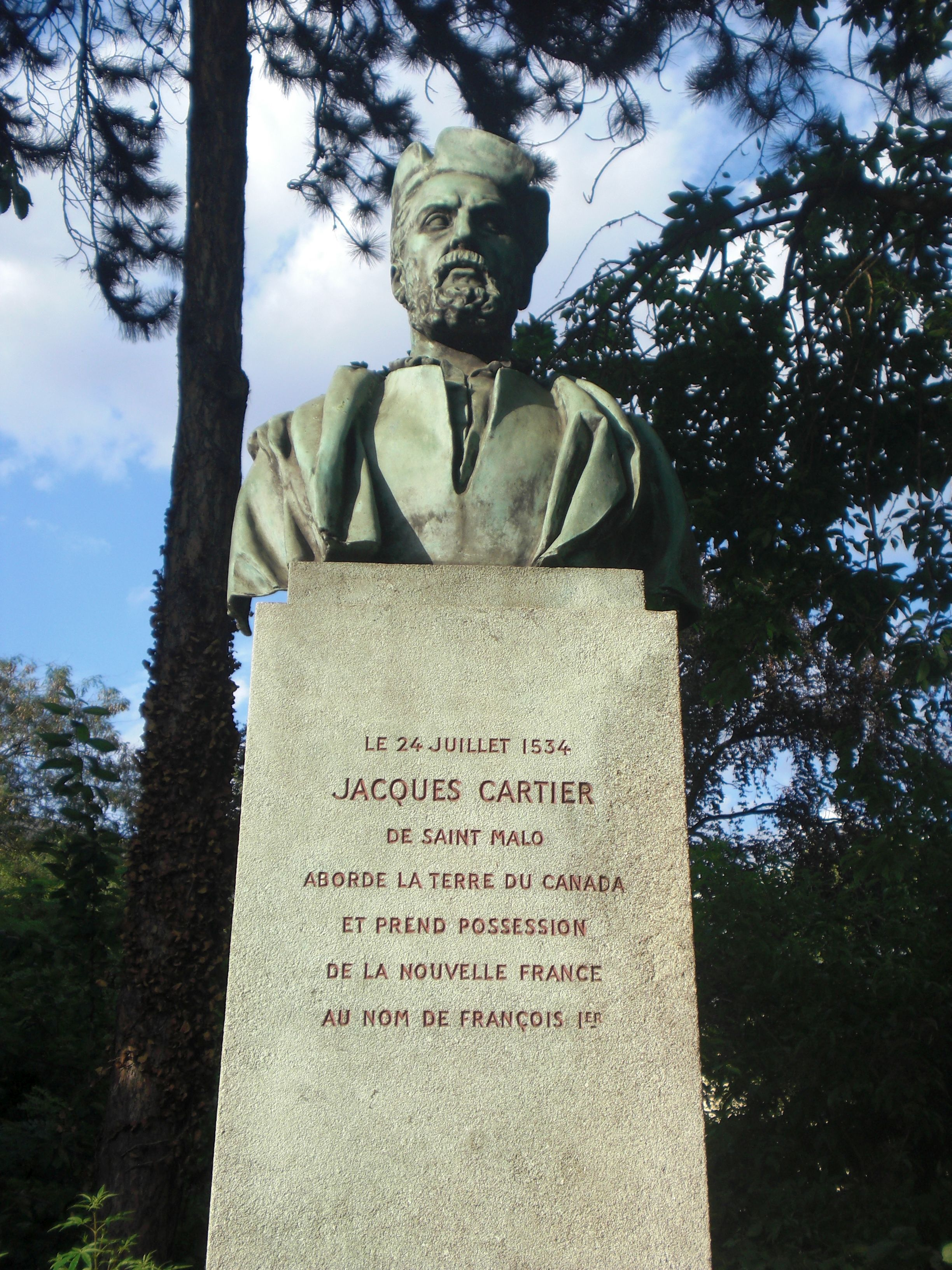 Monumento al Jacques Cartier en Parizo